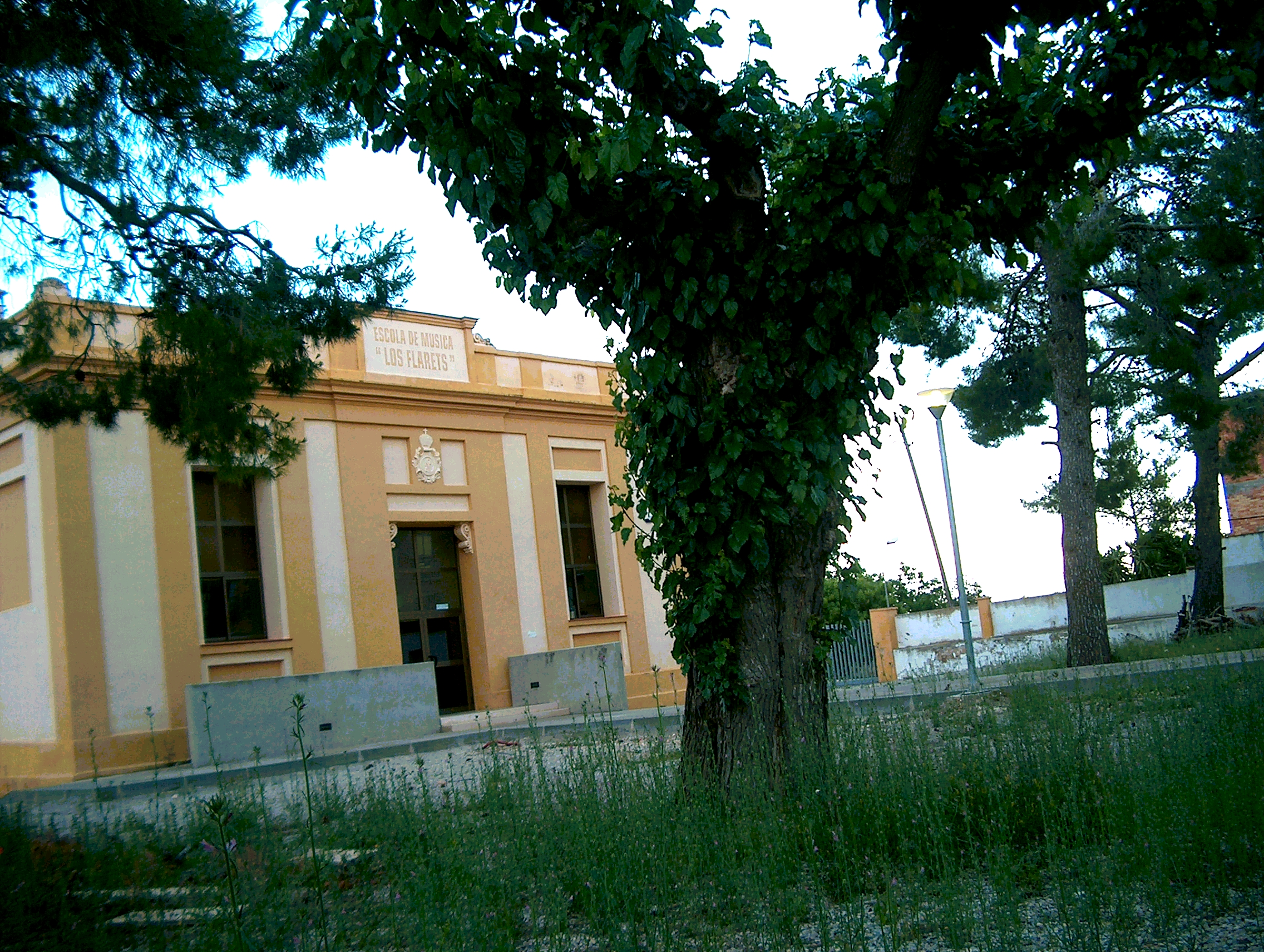 Escuela de música de Santa Bárbara